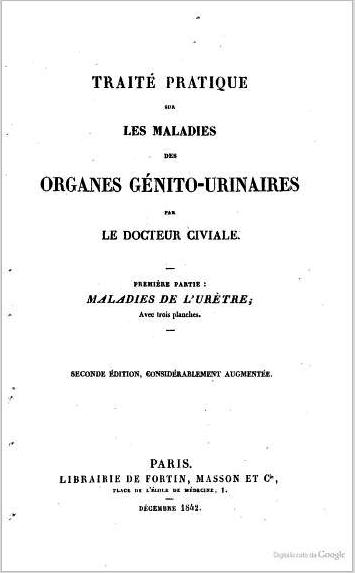 Frontespizio con informazioni editoriali legate all'opera di Civiale